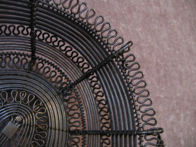 detail súčasného drotárskeho výrobku (z výstavy Ladislava Fapša na hrade Strečno) Exibition of Ladislav Fapšo on castle Strečno